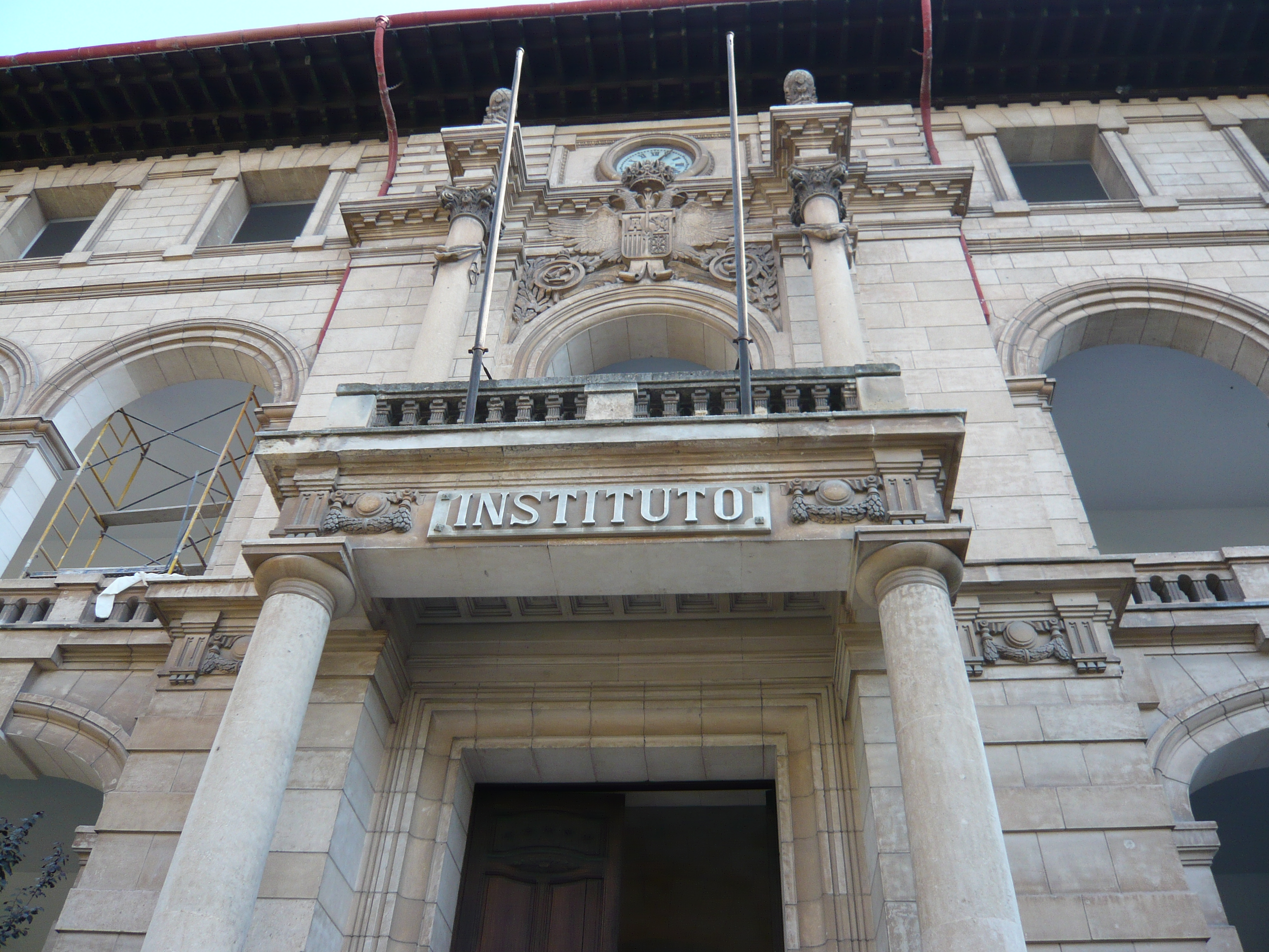 Detall del cos central de la Façana principal de l'IES Ramon llull